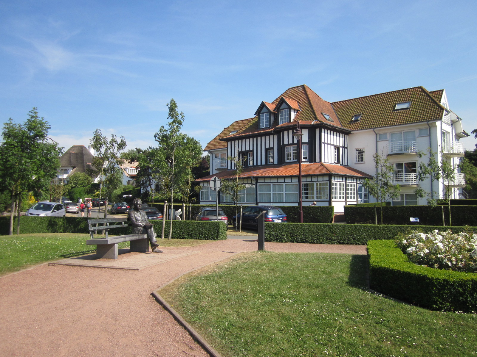 Villa Le Coeur Volant, Normandiëlaan 25 in De Haan, waar Albert Einstein destijds o.m. James Ensor ontmoette.